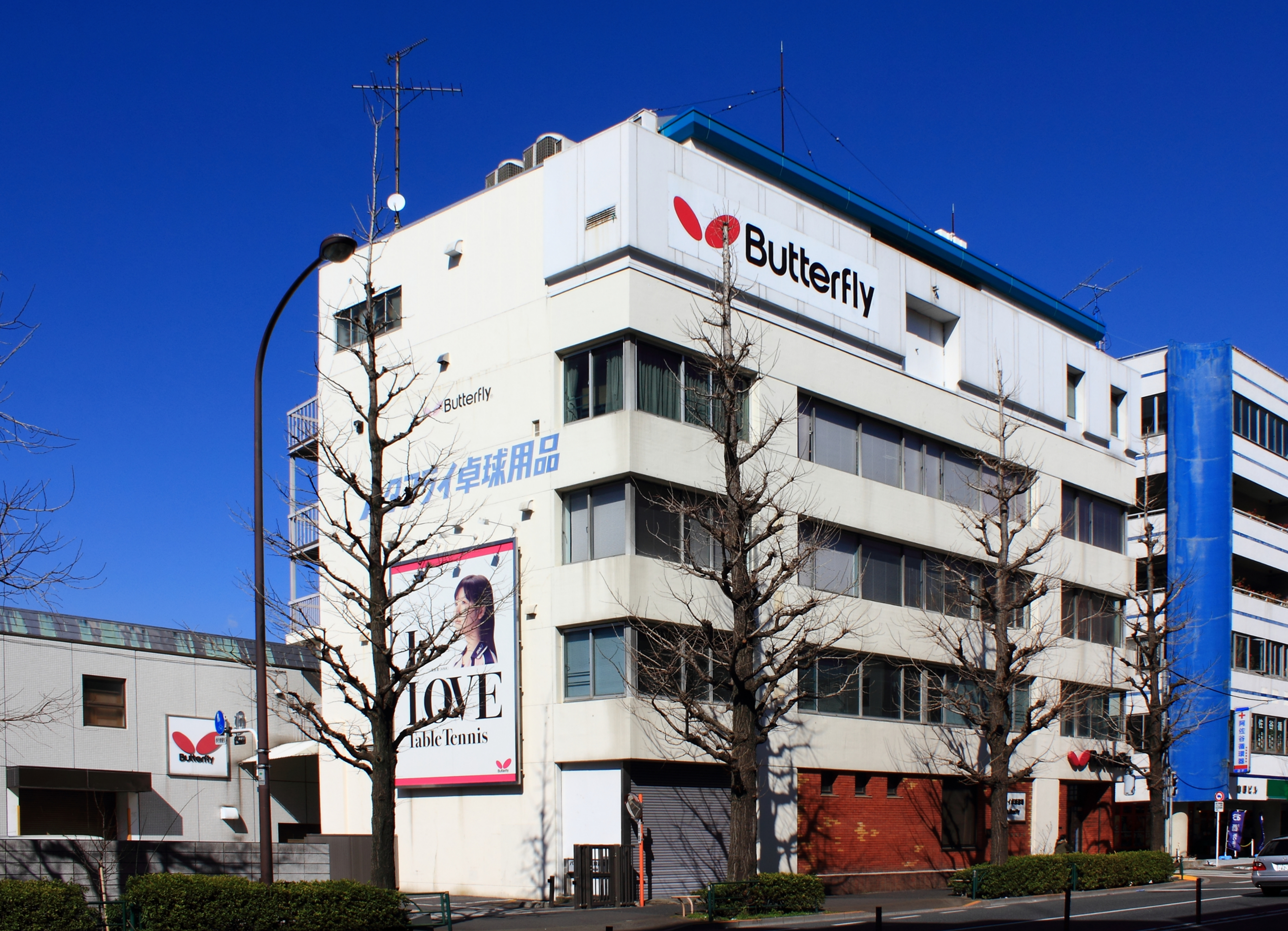 株式会社タマス本社（東京都杉並区）